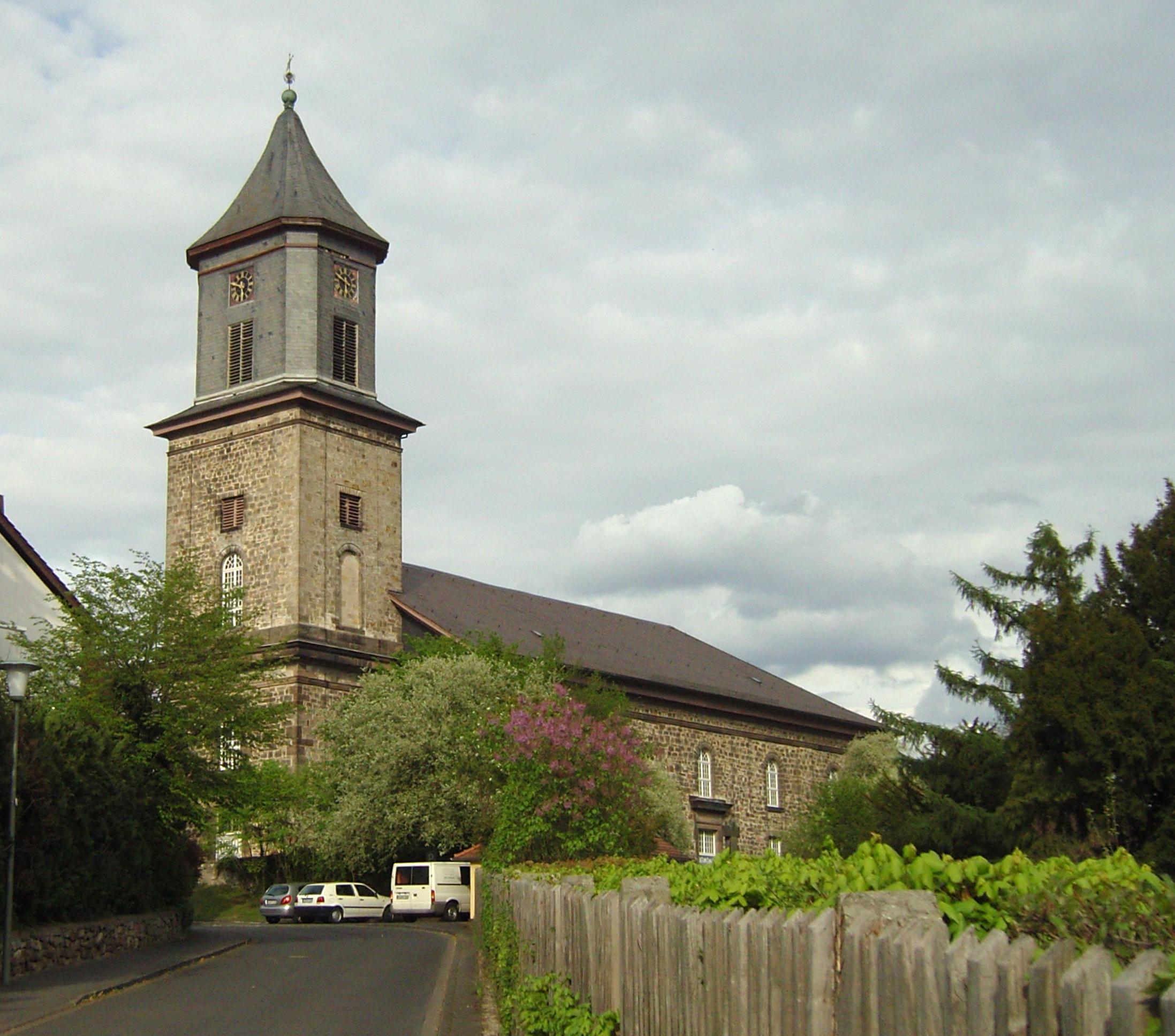 Das Gotteshaus der ev. Glaubengemeinschaft des Kasseler Stadtteils Kirchditmold